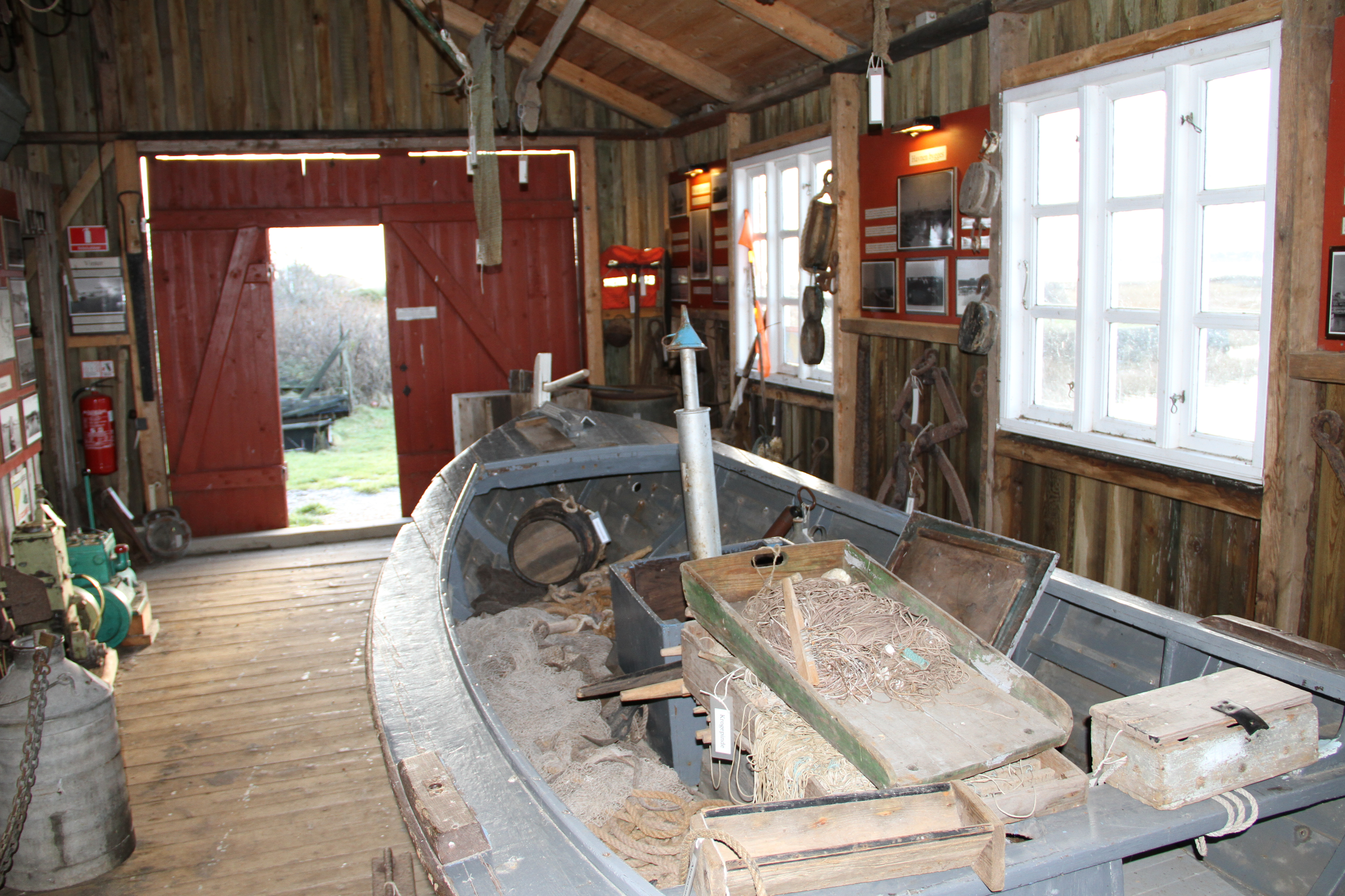 Gammel havn på Fur. Gammelt bundgarnshus indrettet som museum